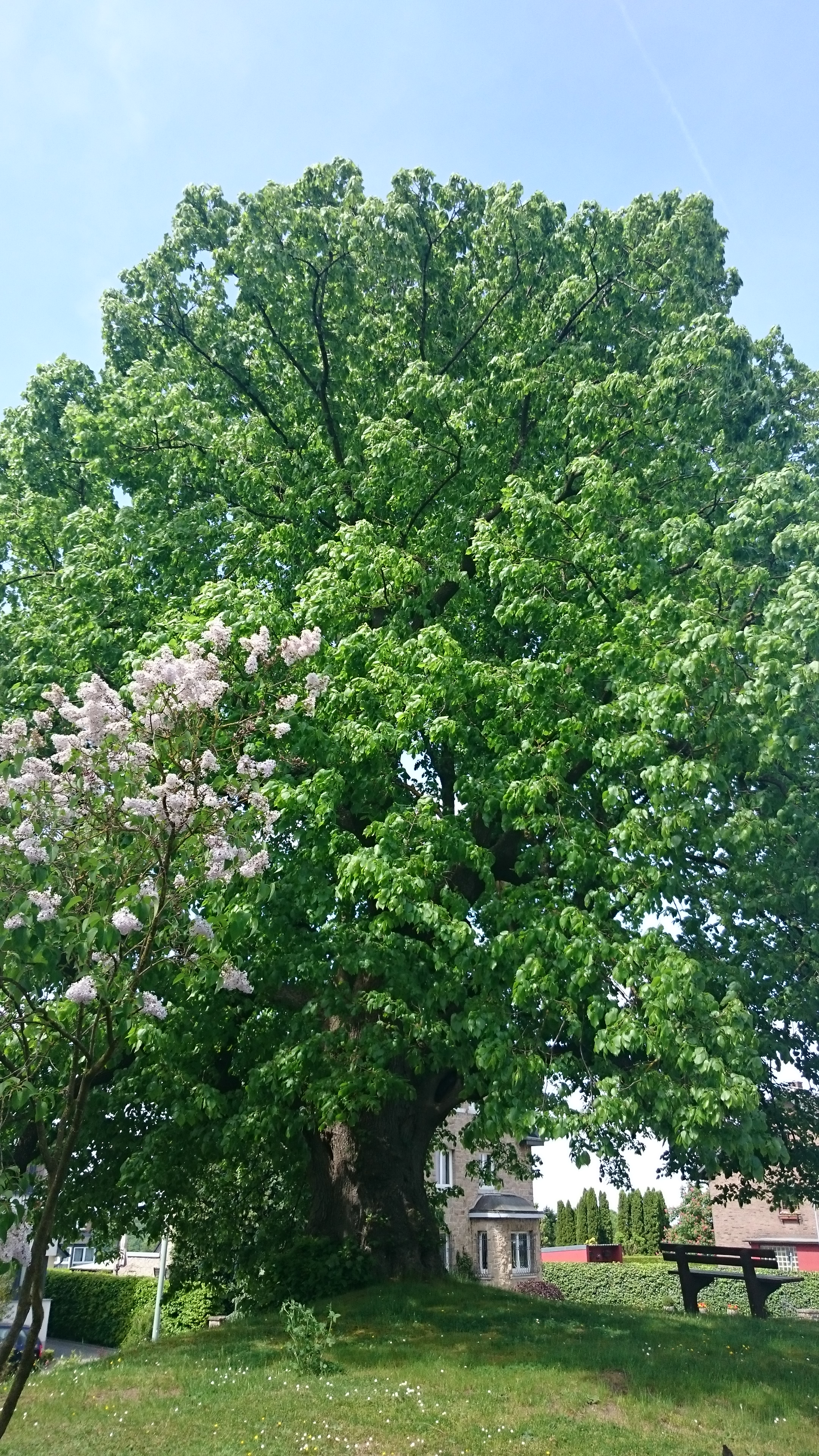 Alte Dorffer Linde. Naturdenkmal in Stolberg /Rheinland